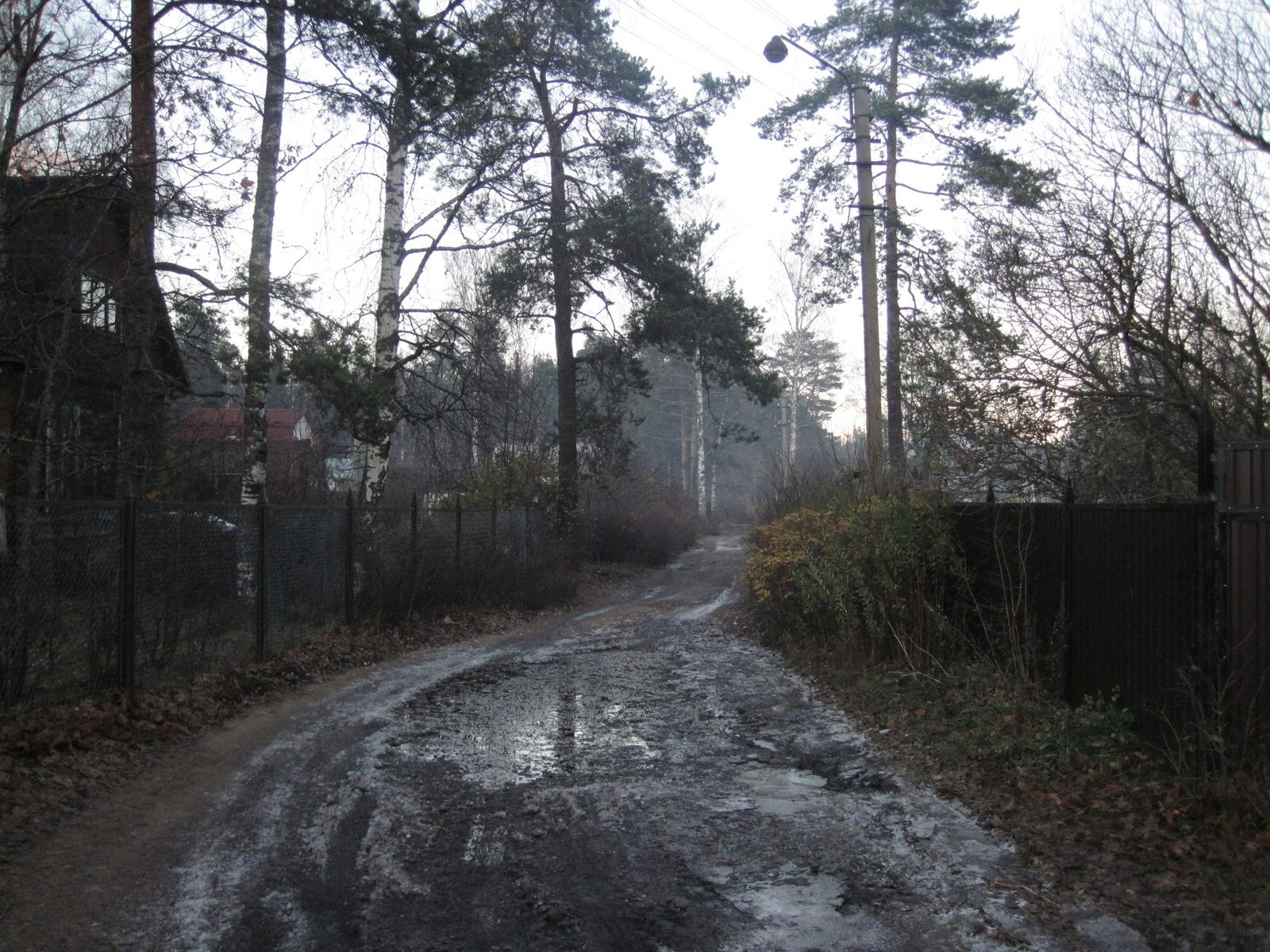 Фотография. Пос. Кирилловское в октябре